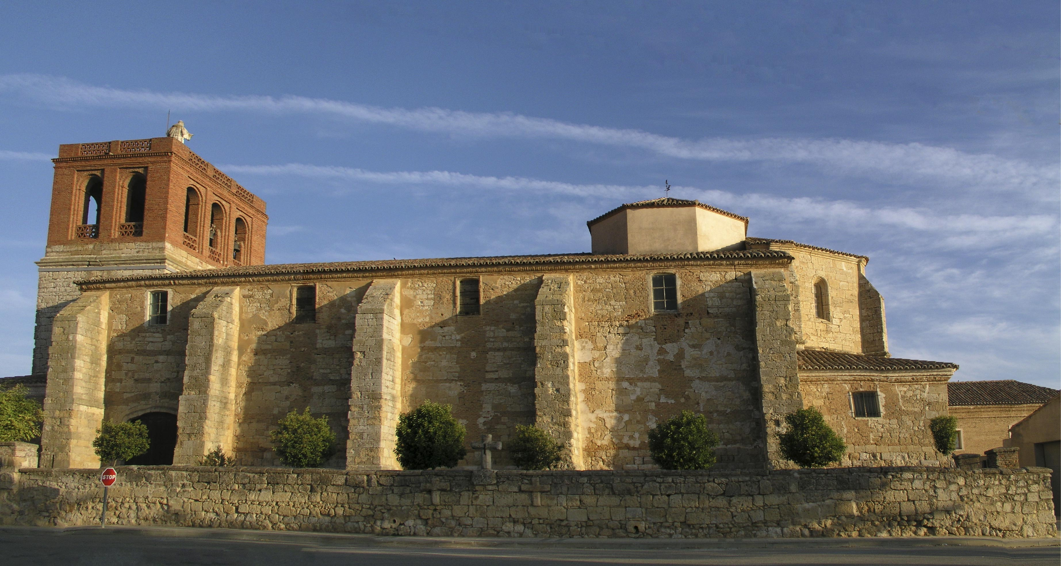 Iglesia parroquial de Nuestra Señora del Barruelo, Palazuelo de Vedija (Valladolid)